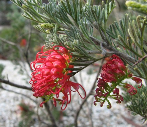 Grevillea preissii subsp. glabrilimba, Maranoa Gardens, Balwyn, Victoria, Australia